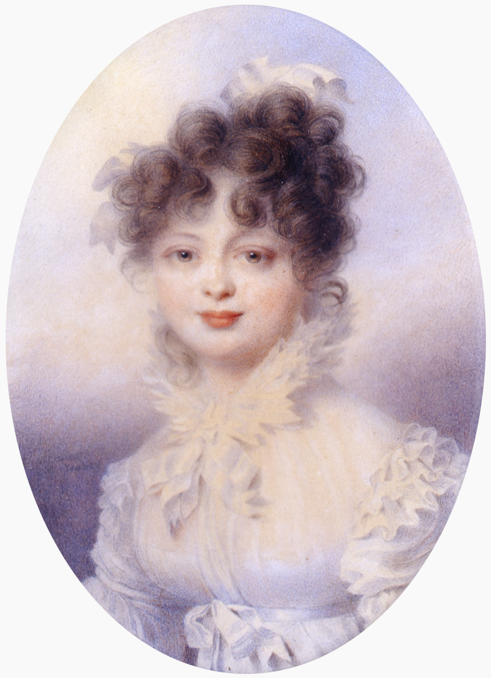 Katharina Pawlowa von Russland; Aquarell auf Bein, ca. 1814 (watercolor on bone, c. 1814)